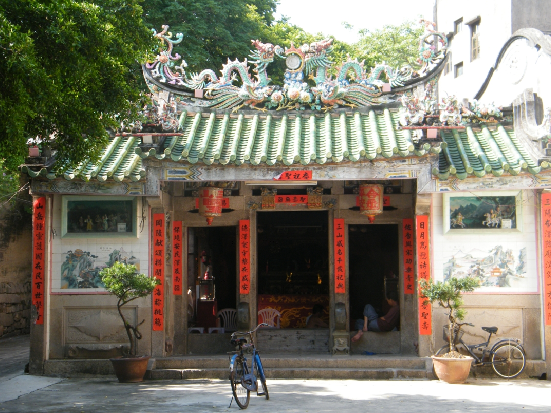 达濠古城外王爷宫。2009.8.6